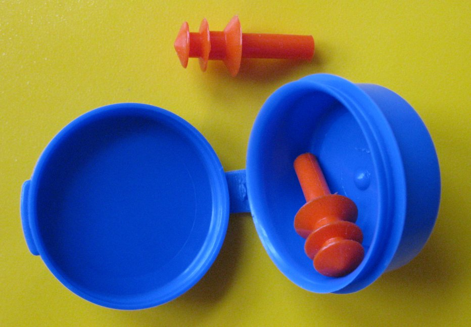 Ohrenstöpsel (mit Verpackung), wie sie Anfang der 1980er Jahre bei der Bundeswehr verwendet wurden